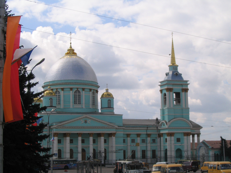 Курск